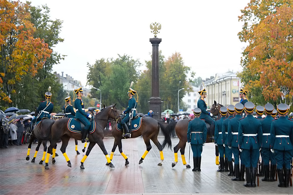 Открытие в Великом Новгороде барельефов на стеле Воинской славы.